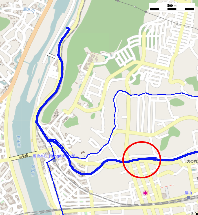 2015年現在の福山市吉津川 This map may be incomplete, and may contain errors. Don't rely solely on it for navigation.